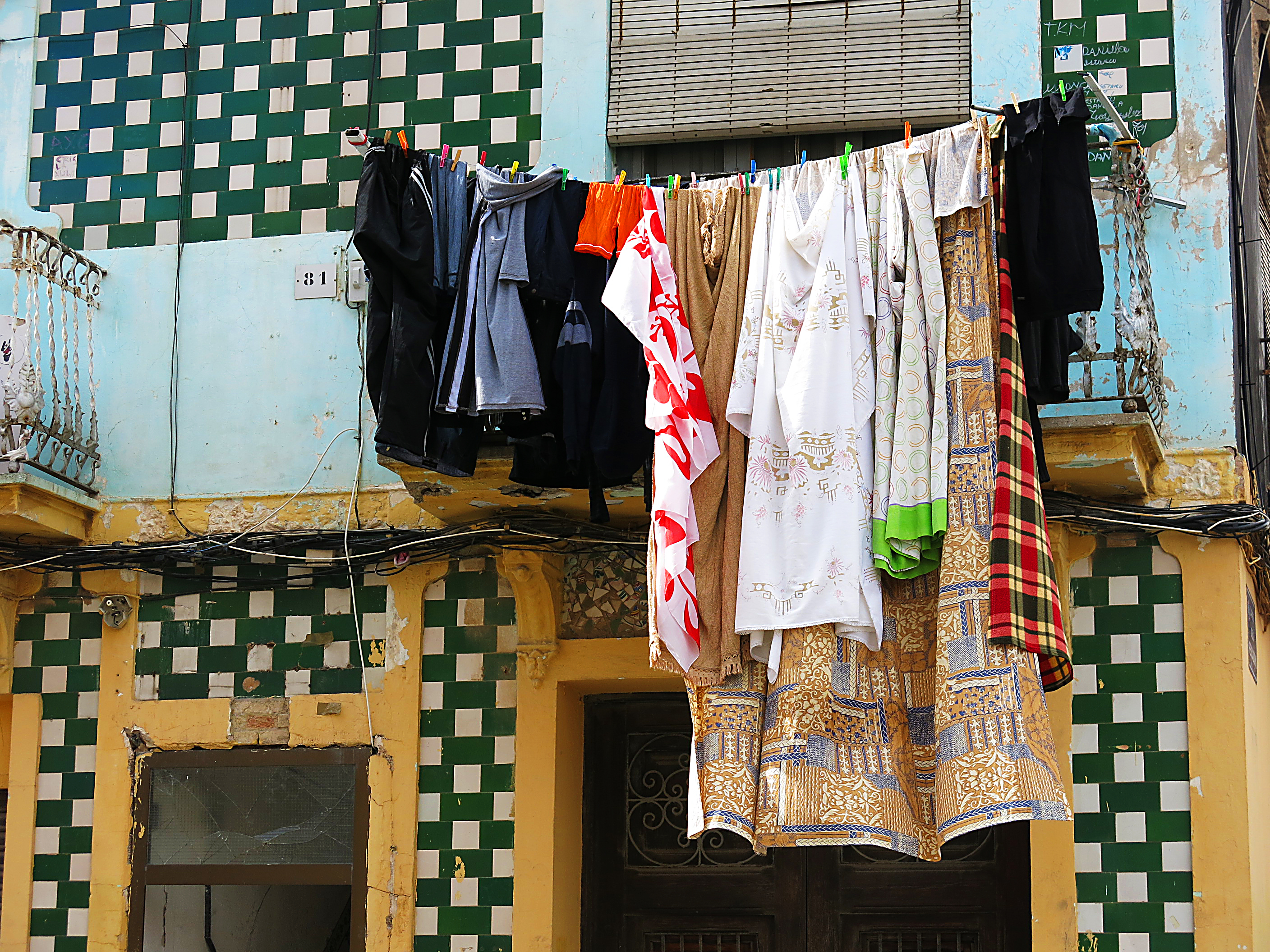 Edifici al c. Progrés 217, el Cabanyal (València), roba estesa